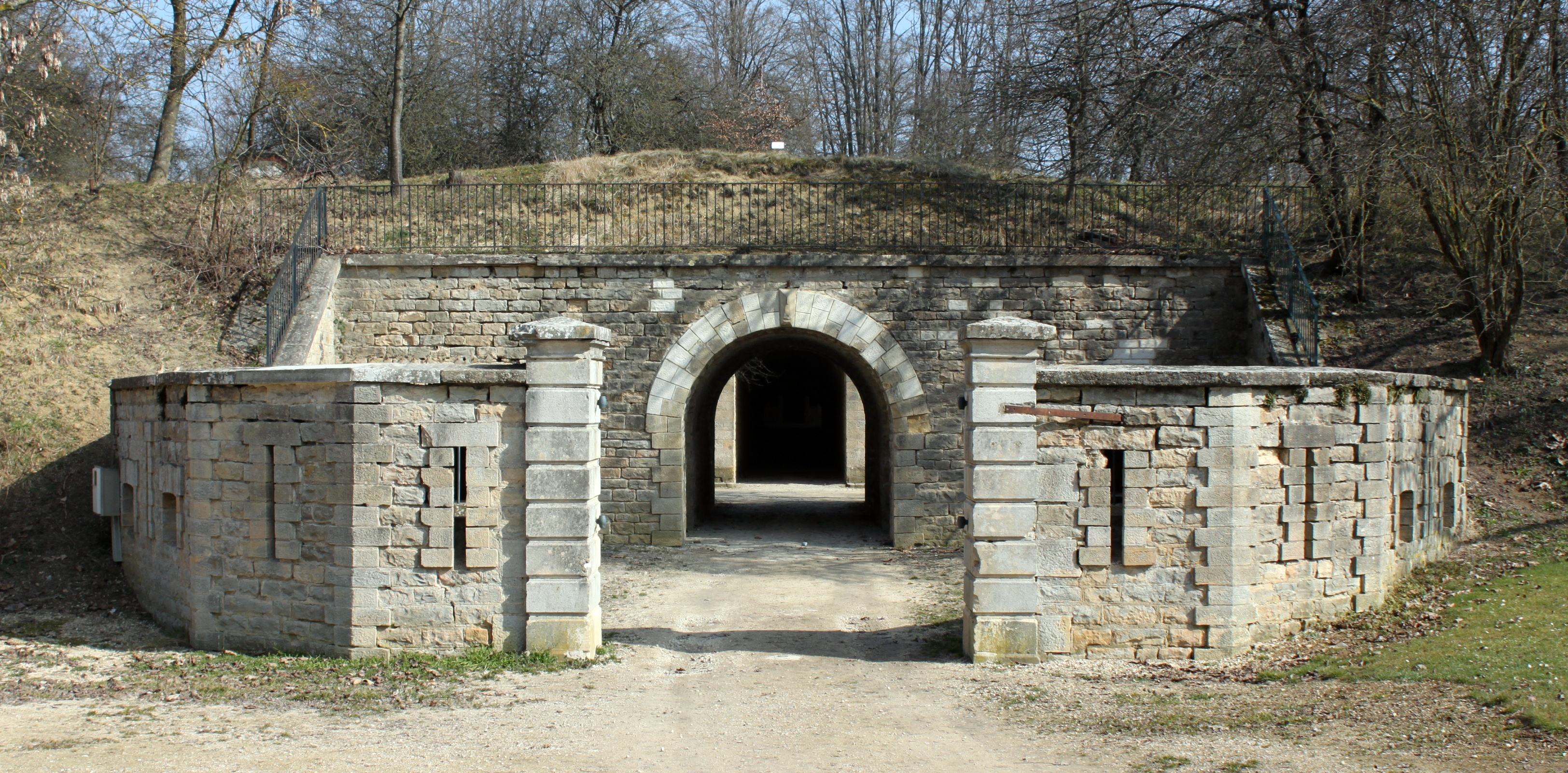 Redoute de Saint-Apollinaire, l'entrée et son ravelin, Saint-Apollinaire, Côte-d'Or, Bourgogne, FRANCE